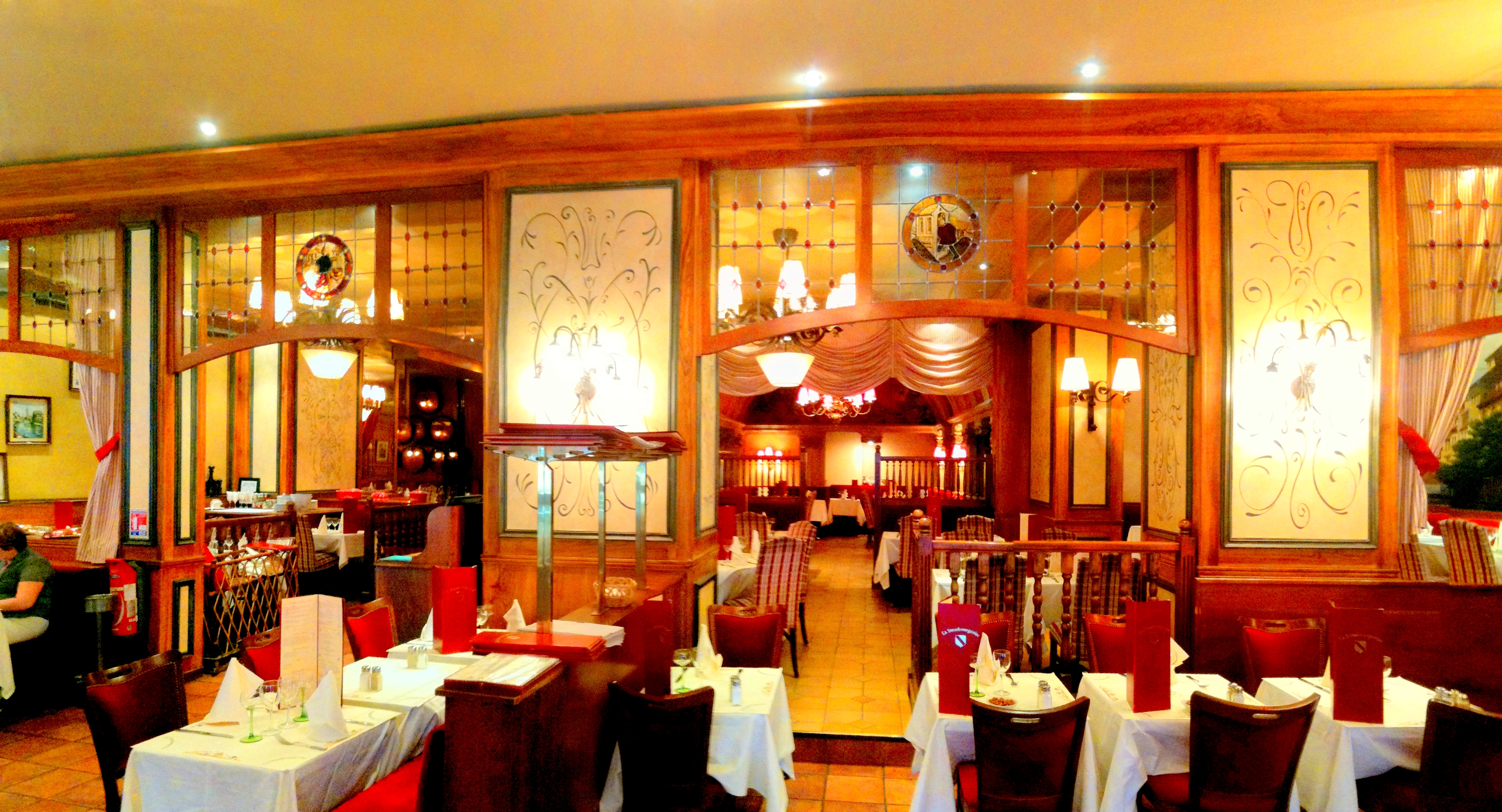 La Strasbourgeoise, 5 Rue du 8 Mai 1945, 75010 Paris, France.